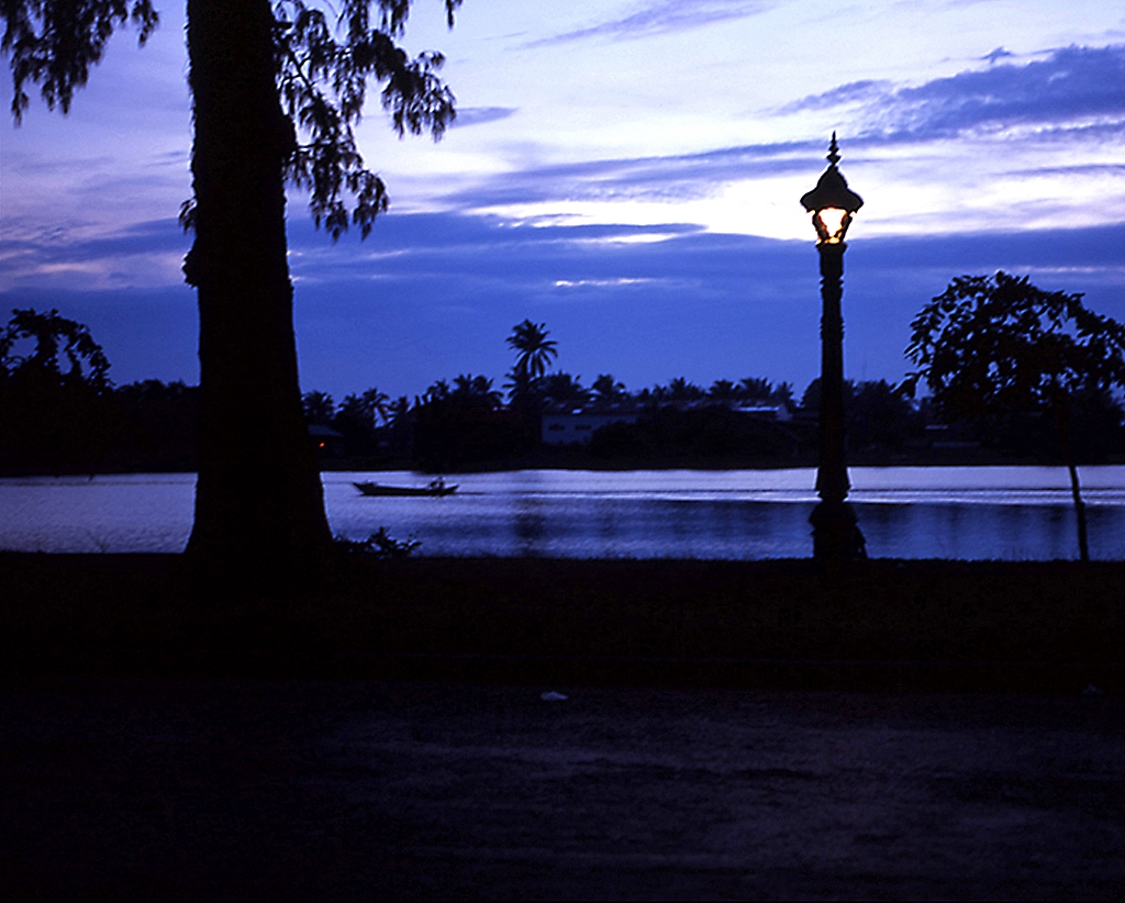 kampot riverside cambodia